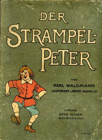 Karl Waldmann [Pseudonym für Karl Schlenker]: Der Strampel-Peter. Ein Bilderbuch für artige und unartige Kinder. Otto Maier Verlag, Ravensburg, um 1905. Illustrationen von Henry Albrecht (1857–1909)